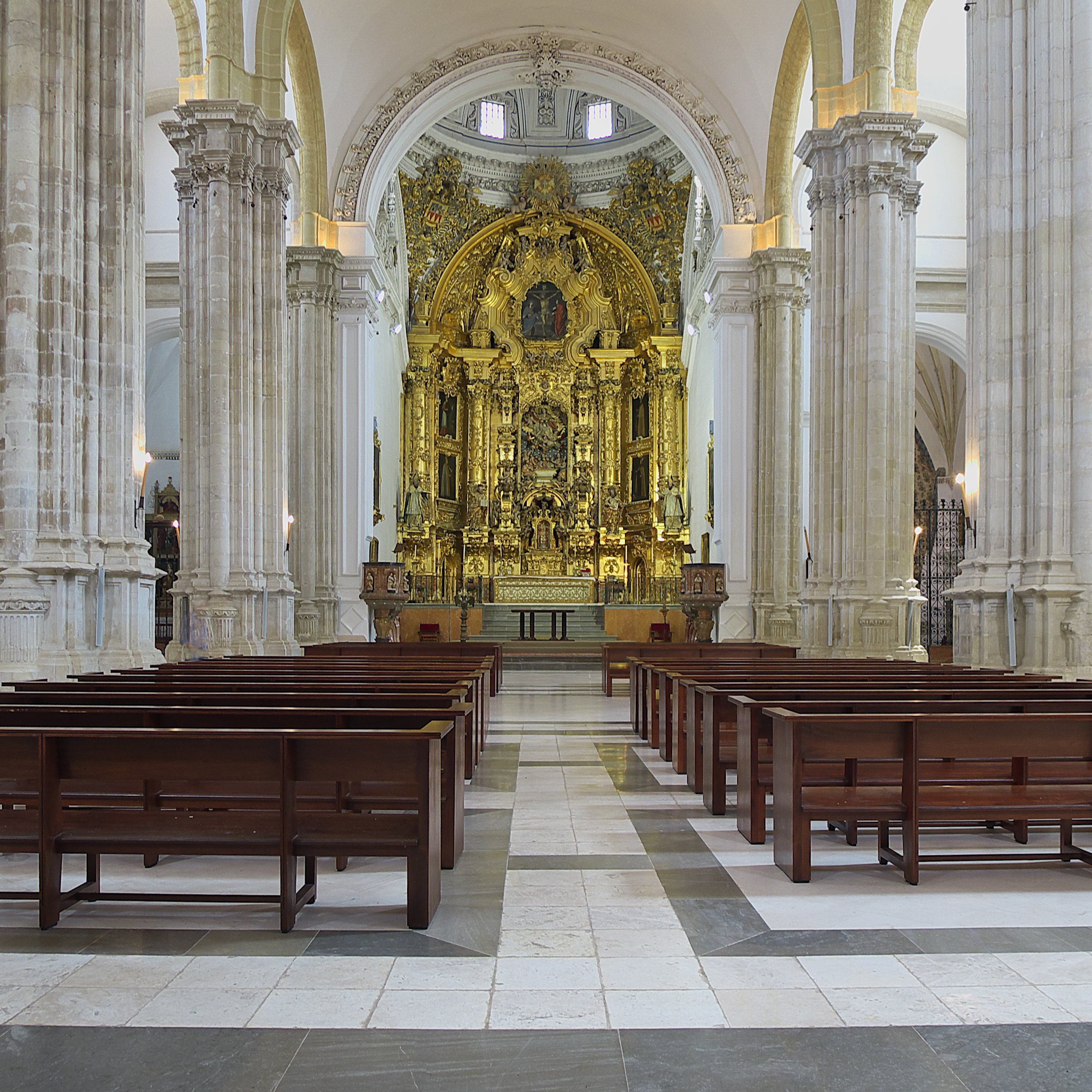 Interior de la iglesia de salón con cabecera poligonal (ca. 1531-1540). Autoría desconocida, atribuible a Diego de Siloé, o Diego de Riaño. El retablo mayor es obra de Juan Guerra y José Fabré (1764) con la escultura de la Asunción de la Virgen, de Juan Bautista Finache.